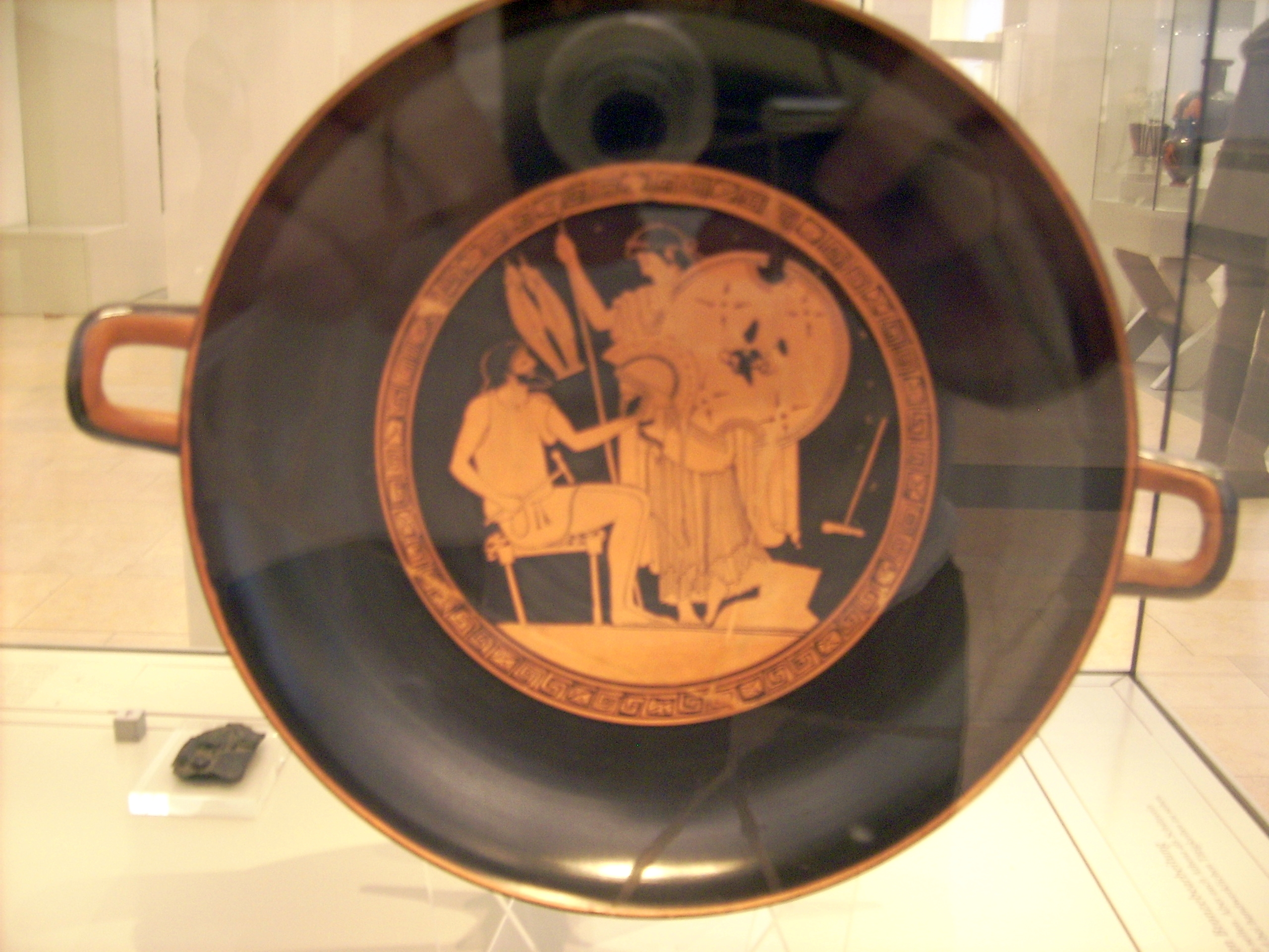 Innenbild des namengebenden Werkes des Erzgießerei-Malers: Hephaistion übergibt Thetis Waffen für Achilles, Durchmesser 30,5 cm, in Vulci gefunden, 1837 für die Antikensammlung Berlin erworben